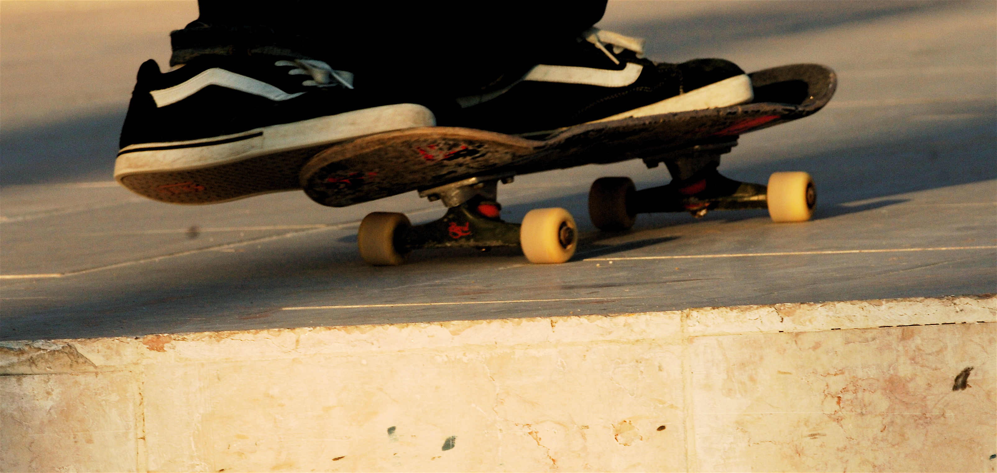 A young boy skateboarding in Sesimbra, Portugal